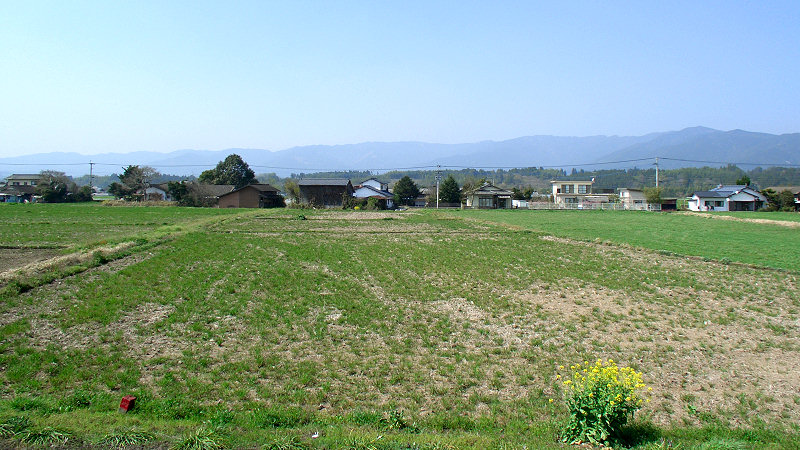 くま川鉄道湯前線ja:新鶴羽駅 駅周辺 ホーム上から北側を見る。電線と電柱の見える辺りがja:国道219号。 撮影者/著者/著作権保有者 : MK Products (本人がアップロード) 撮影日 : 2007/03/30 新鶴羽駅用にアップロードした画像です。良い画像があれば別の画像に変えてください。